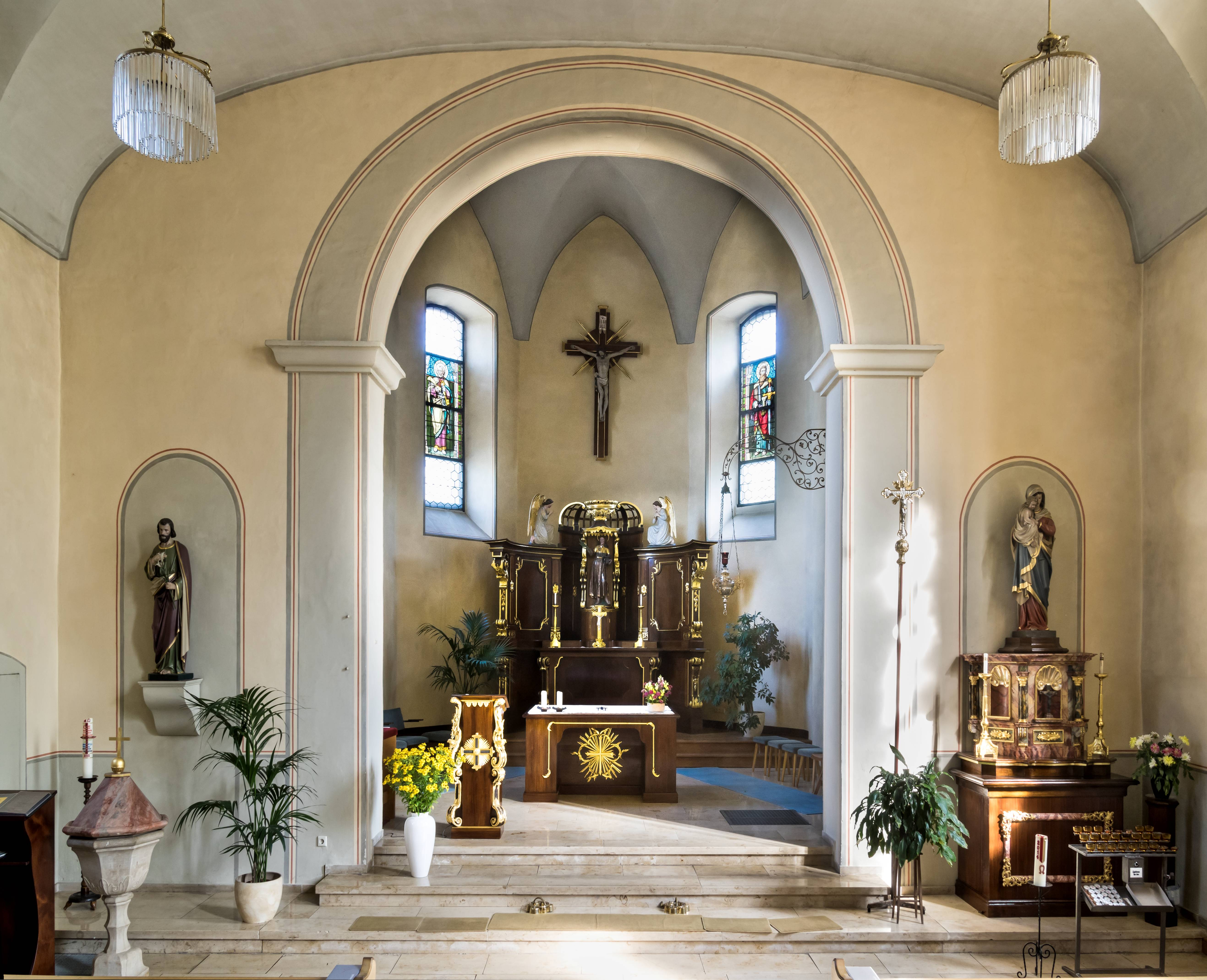 St Vitus in Wettlebrunn eine Teilort von Staufen Blick zum Chor und Altar